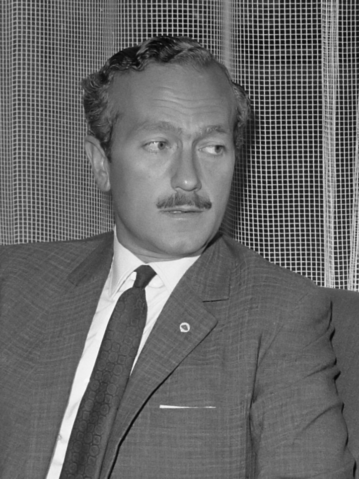 Colin Chapman, de manager van [autocoureur] Jim Clark, die door de Zandvoortse politie was gearresteerd, is door de Officier van Justitie te Haarlem vrijgelaten, op voorwaarde dat hij op 20 juli zal verschijnen voor de politierechter. Na zijn vrijlating ging Chapman (links) naar het Bouwes Palace Hotel te Zandvoort waar hij enige persvertegenwoordigers te woord stond. Naast hem zijn advocaat mr. A.S. Groen 19 juli 1965